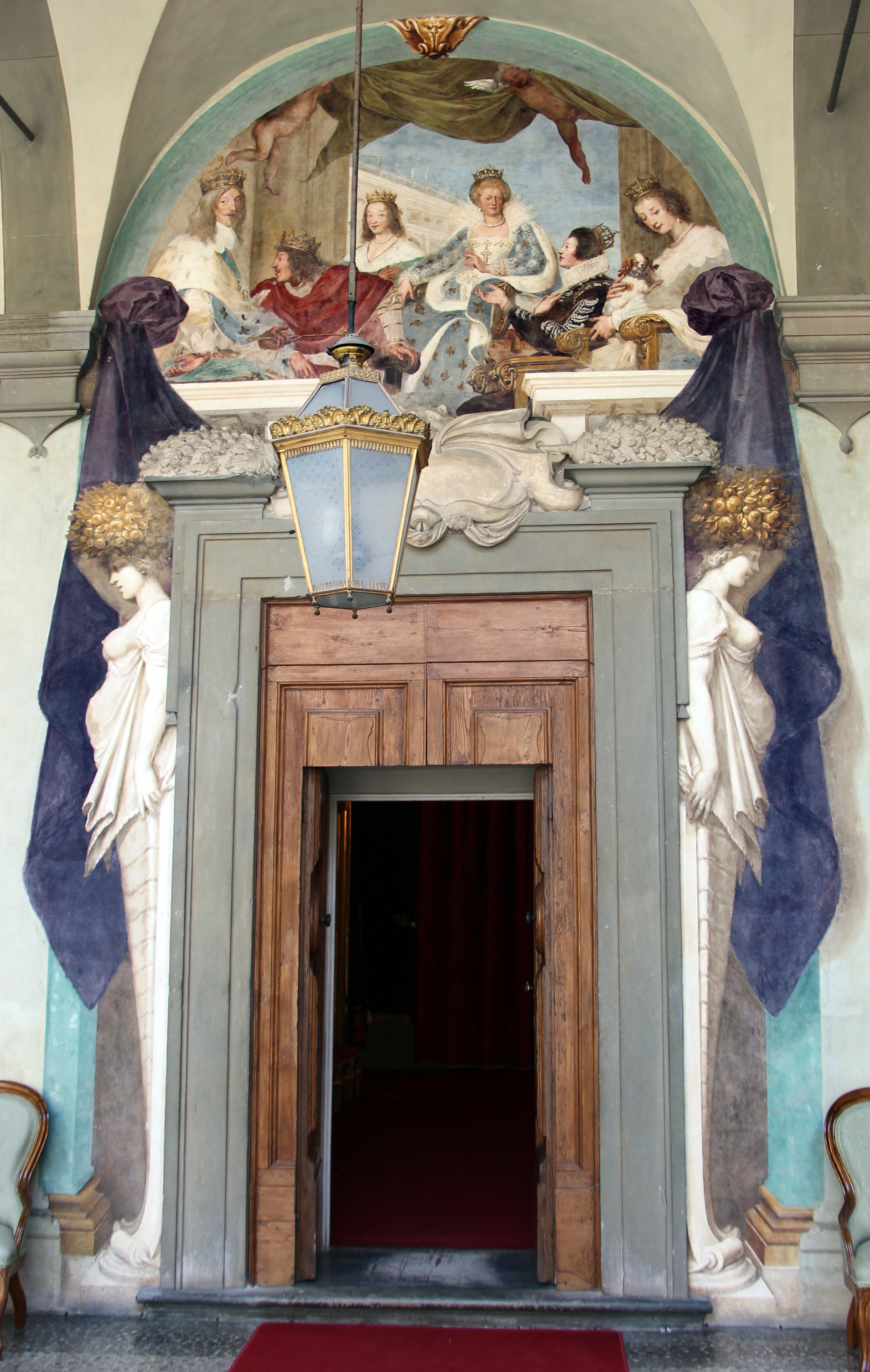 Villa medicea della Petraia - MIBAC The making of this document was supported by Wikimedia CH. (Submit your project!) For all the files concerned, please see the category Supported by Wikimedia CH. This is a photo of a monument which is part of cultural heritage of Italy.